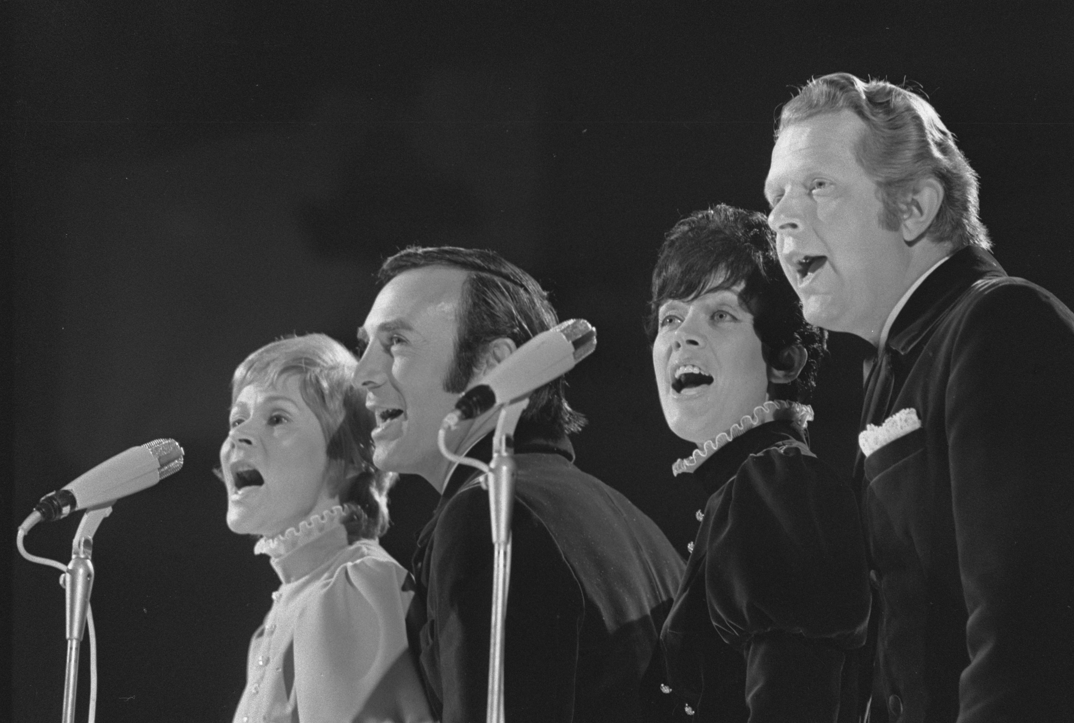 Collectie / Archief : Fotocollectie Anefo Reportage / Serie : [ onbekend ] Beschrijving : Grand Gala du Disque in RAI Amsterdam. Anita Kerr Singers Datum : 27 februari 1970 Locatie : Amsterdam, Noord-Holland Persoonsnaam : Anita Kerr Singers Instellingsnaam : RAI Fotograaf : Mieremet, Rob / Anefo Auteursrechthebbende : Nationaal Archief Materiaalsoort : Negatief (zwart/wit) Nummer archiefinventaris : bekijk toegang 2.24.01.05 Bestanddeelnummer : 923-3035